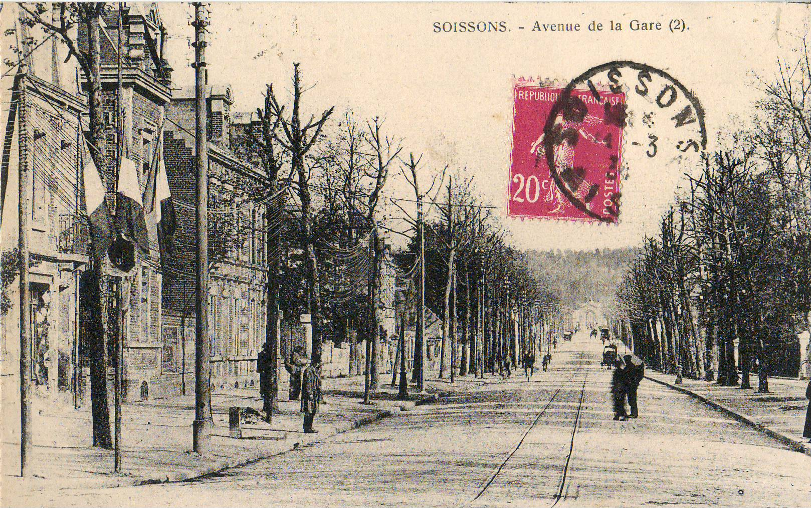 Carte postale ancienne éditée par B. Nougarède et H. Lestrat à Soissons : Soissons - Avenue de la Gare (2) Noter la voie de tramway dans l'axe de la rue, et, au fond, la silhouette de la gare